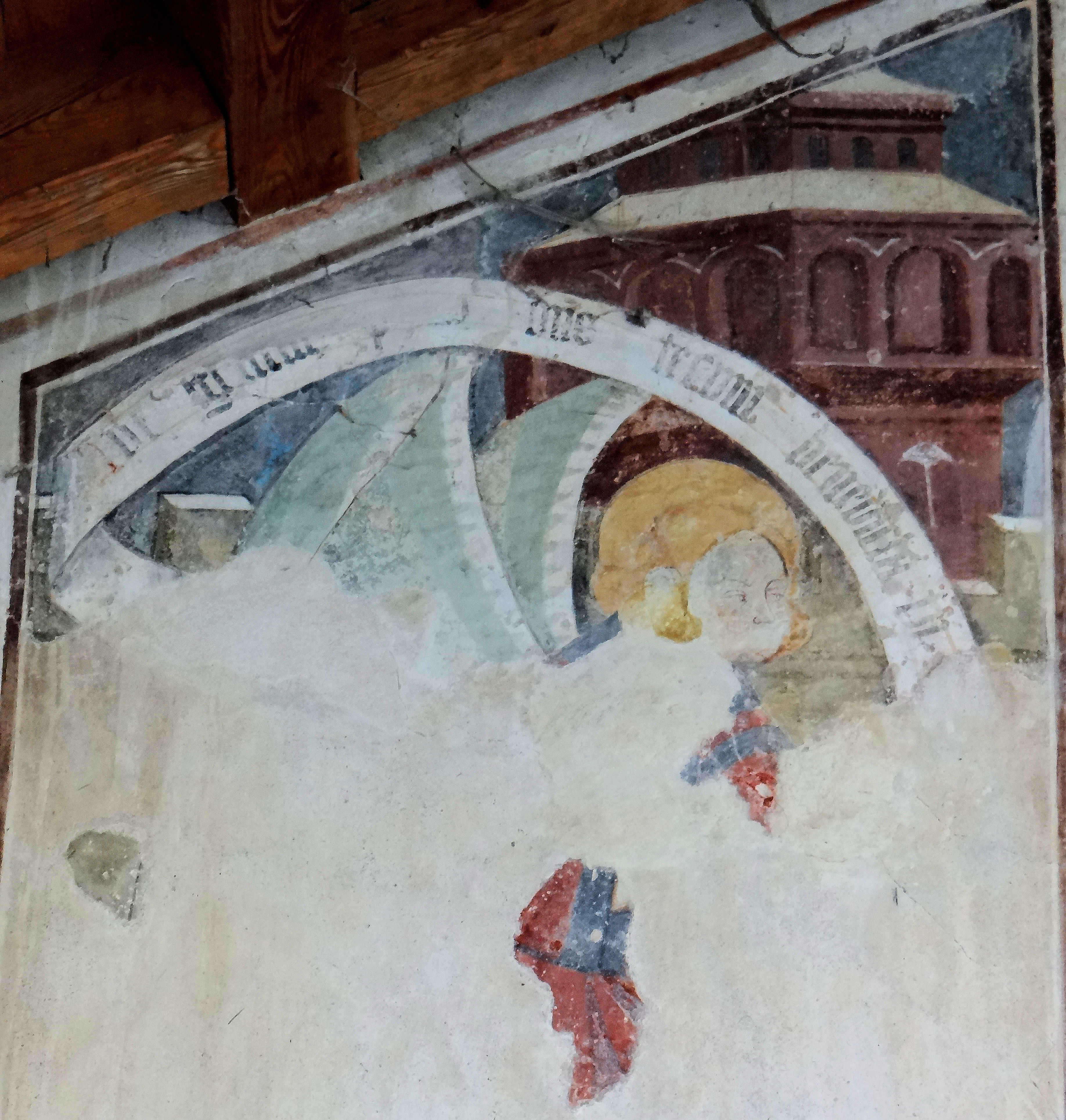 Saorge - Église de la Madone del Poggio - Portail est : un ange